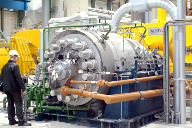 Weltgrößte Kesselspeisepumpe mit ca. 40.000kW Antriebsleistung.